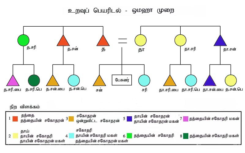 Drawn by the user who uploaded it here.